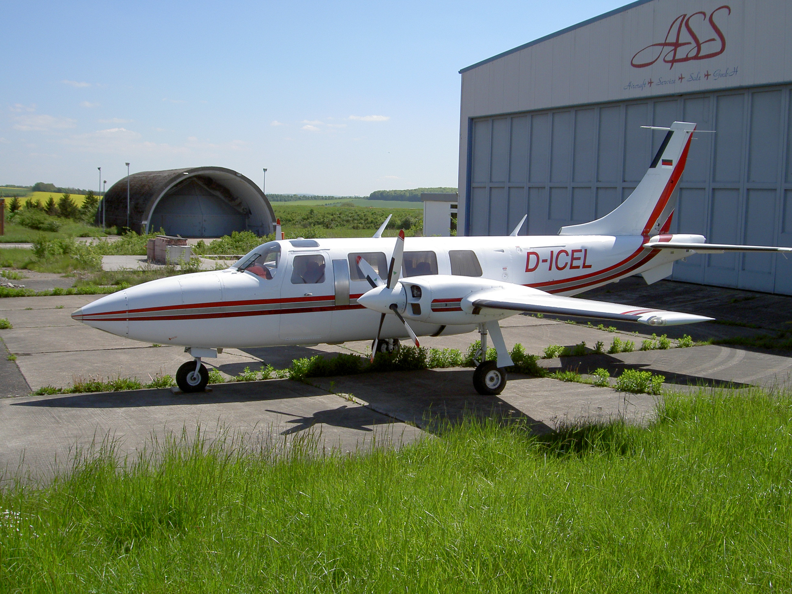 D-ICEL, Piper Aerostar 601P at Zweibruecken airport.